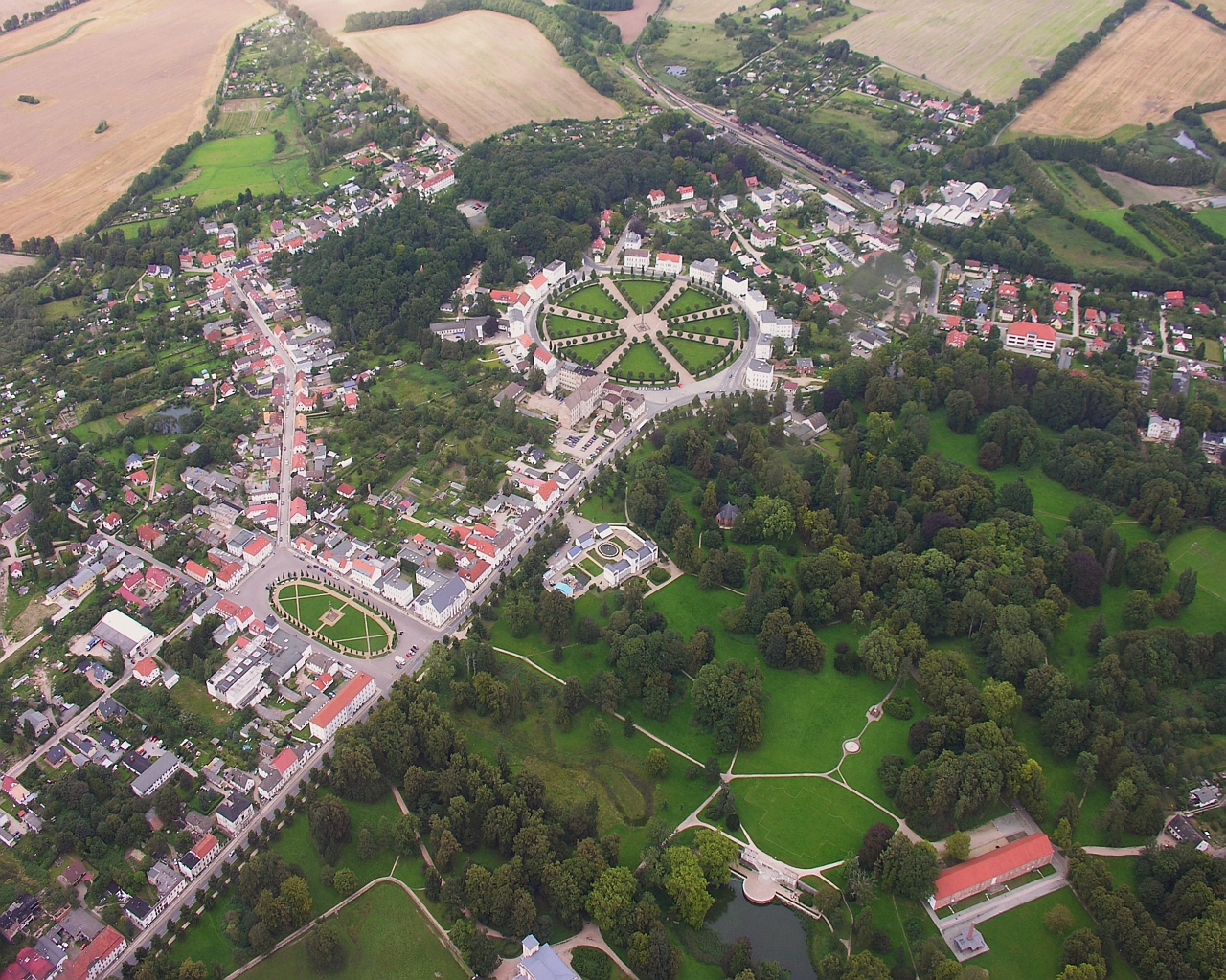 Luftbild Stadtmitte (Zentrum) von Putbus auf Insel Rügen in der Ostsee - Foto Wolfgang Pehlemann Steinberg IMG_0575